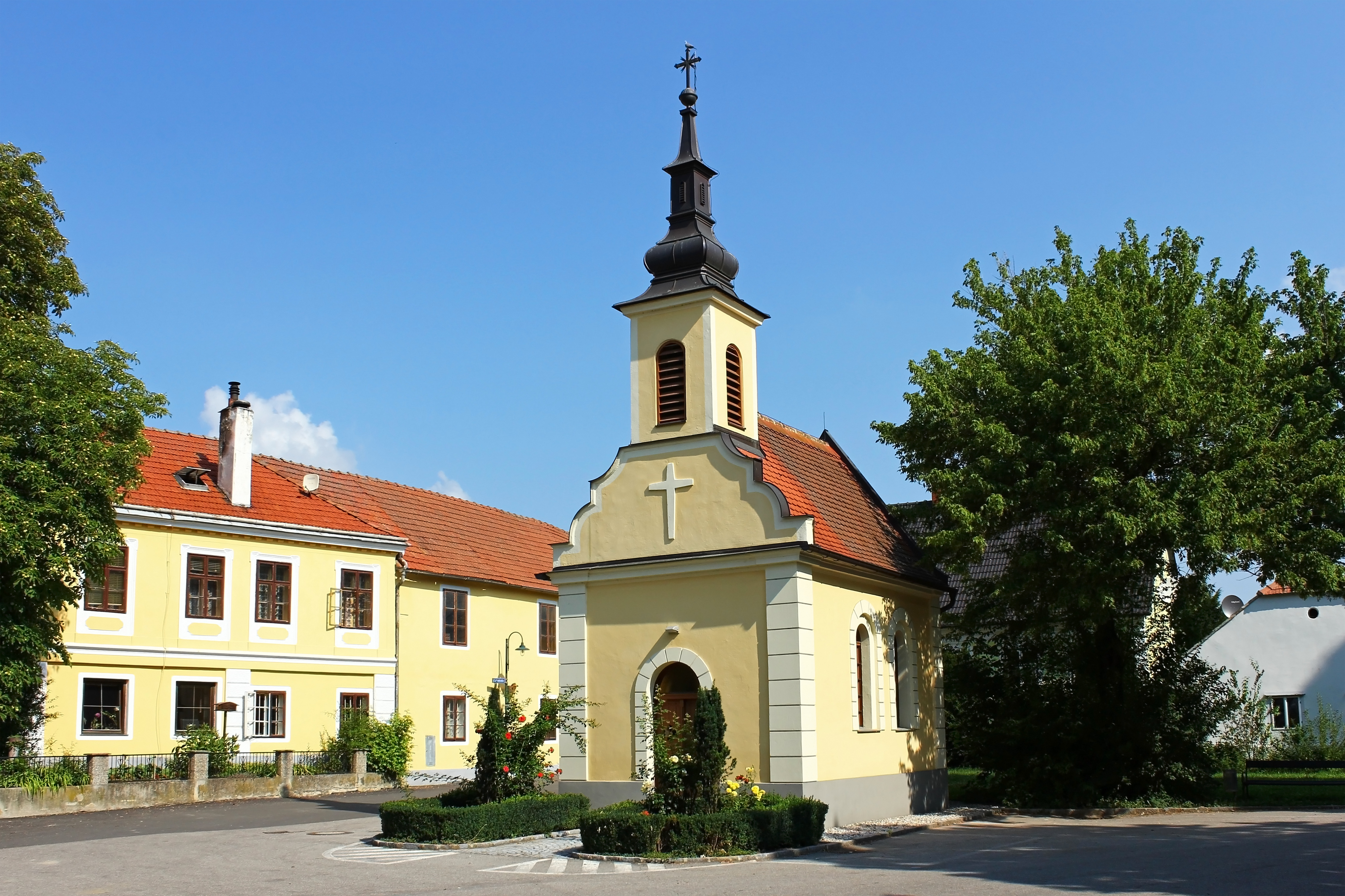 Die an einer Straßenkreuzung gelegene Ortskapelle von Walkersdorf wurde 1893 errichtet. Sie hat einen geschweiften Giebel, einen Dachreiter und eine eingezogene Apsis.